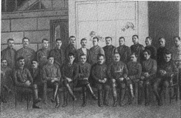 Члени уряду та активісти ДКР в Харкові перед відправкою на фронт 1918. У першому ряду крайній зліва Руднєв, шостий ліворуч Артем.